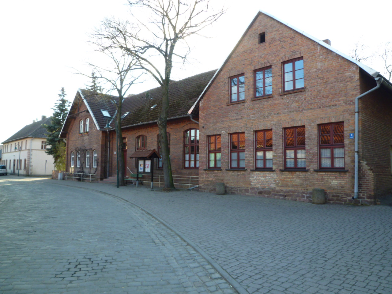 Calvörde-Zobbenitz, ehemaliges Schulhaus in Zobbenitz, heute ist es das Dorfgemeinschaftshaus, 2012